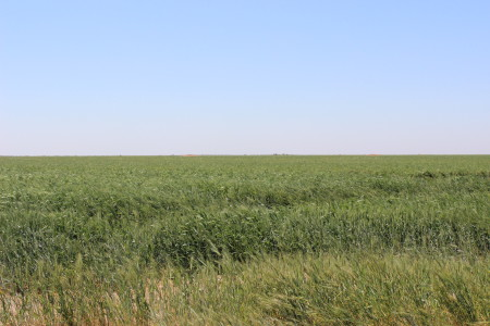 حقل